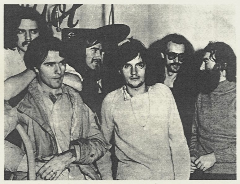 Lard Free : Jean Jacques Miette basse, Dominique Triloff orgue Jacky Chantrier technique son, François Mativet guitare Philippe Bolliet sax tenor, Gilbert Artman Drums